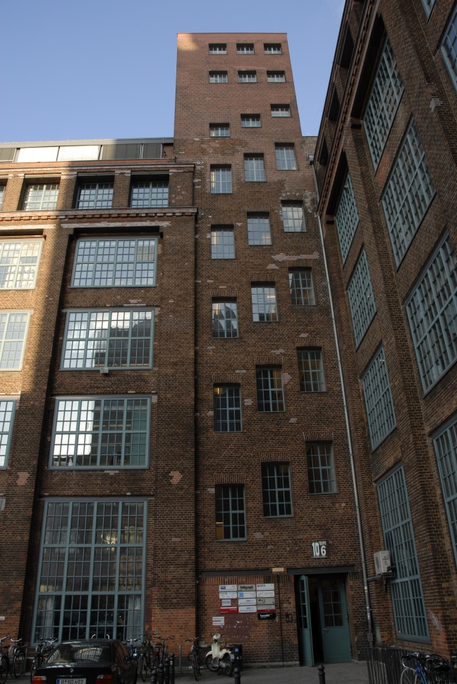 Außenansicht von ALEX Offener Kanal Berlin. ALEX sitzt im EG und im 1. Stock